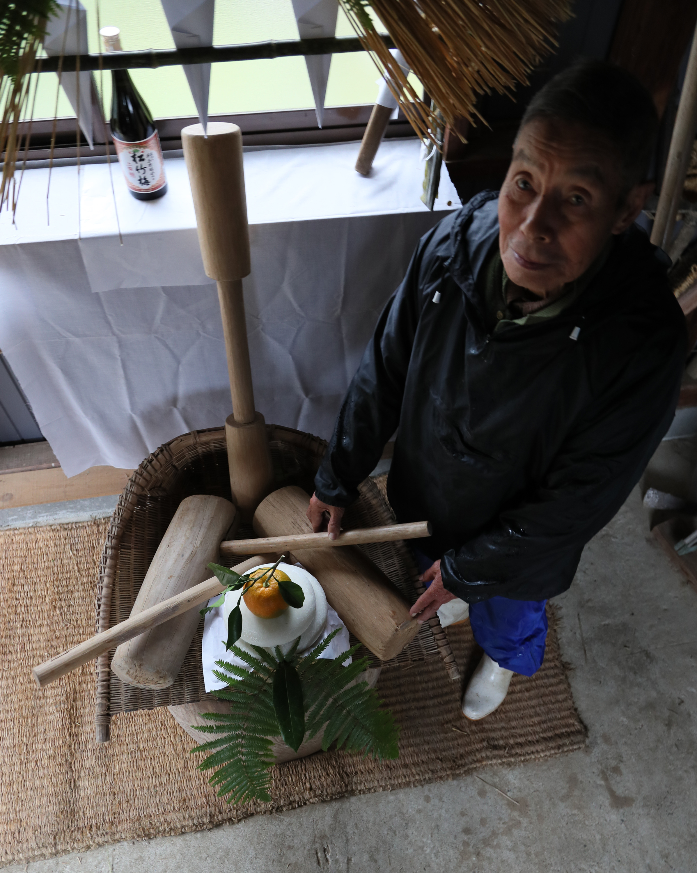 餅つきの横杵をX字に交差させ、十字架に見立てる臼飾り。現在、天草市河浦町今富の川嶋富登喜（ふとき）さん宅にだけ残っている。杵の組み方はイエス・キリストに仕えた１２人の使徒の一人、聖アンデレが処刑されたとされるX字型の「聖アンデレ十字」に由来しているとみられる。